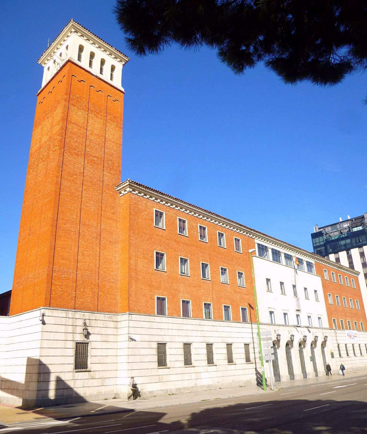 Burgos - Delegación del Ministerio de Defensa